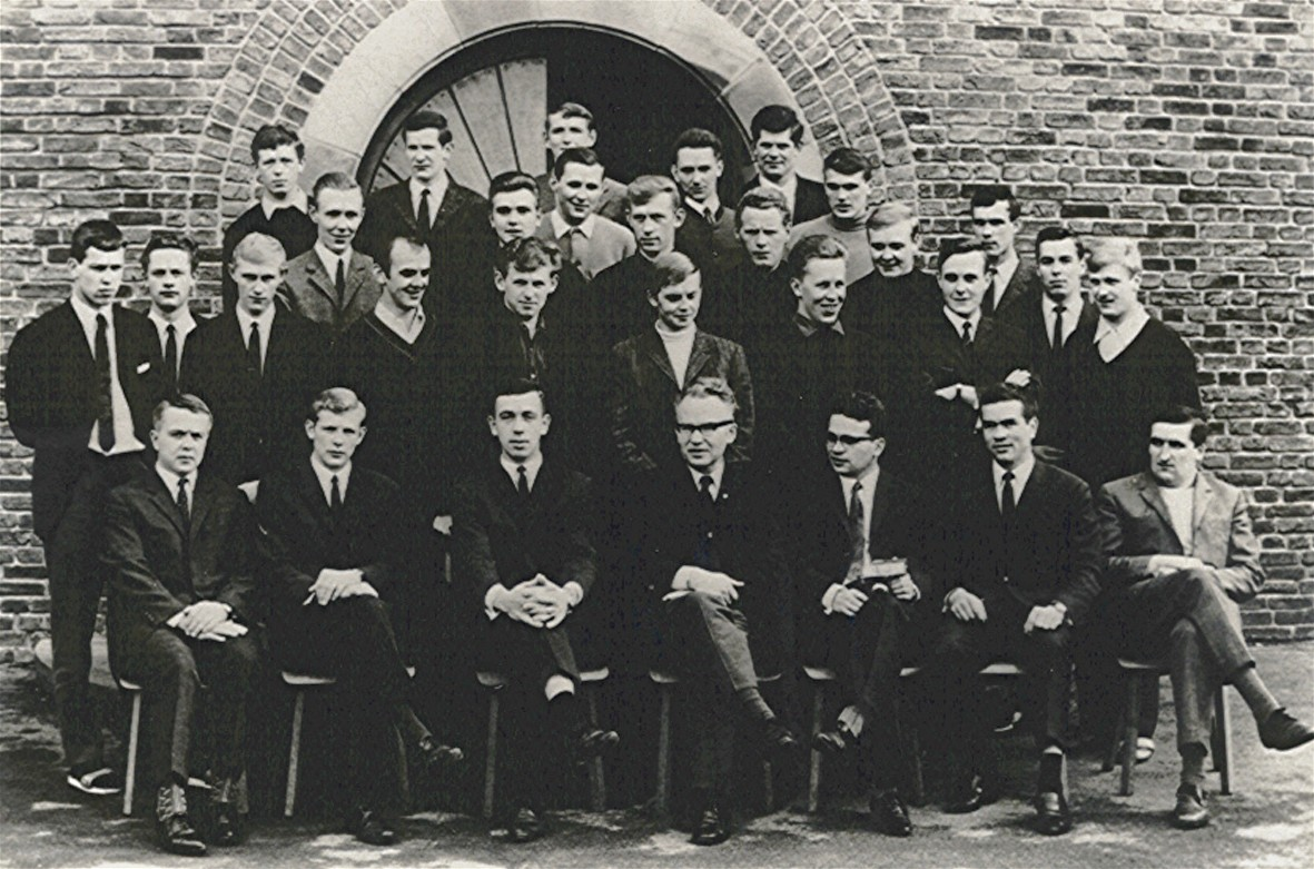 Bernhard Schulte mit Absolventen des Jungbauernkurses 1959 LVHS Freckenhorst